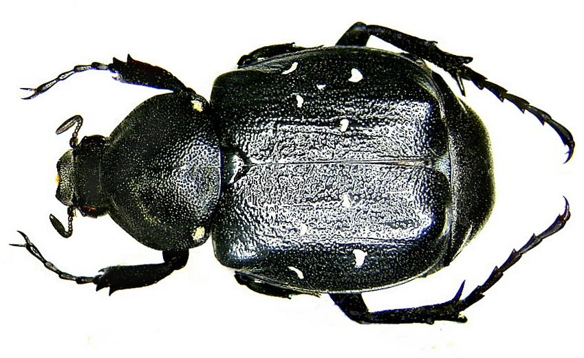 Familie: Scarabaeidae Groesse: 17-22 mm Verbreitung: Europa Ökologie: Entwicklung im morschen Holz von Laubbäumen Fundort: Italien, Südtirol, Vinschgau, Partschins leg.det. U.Schmidt, 1992 Photo: U.Schmidt, 2005